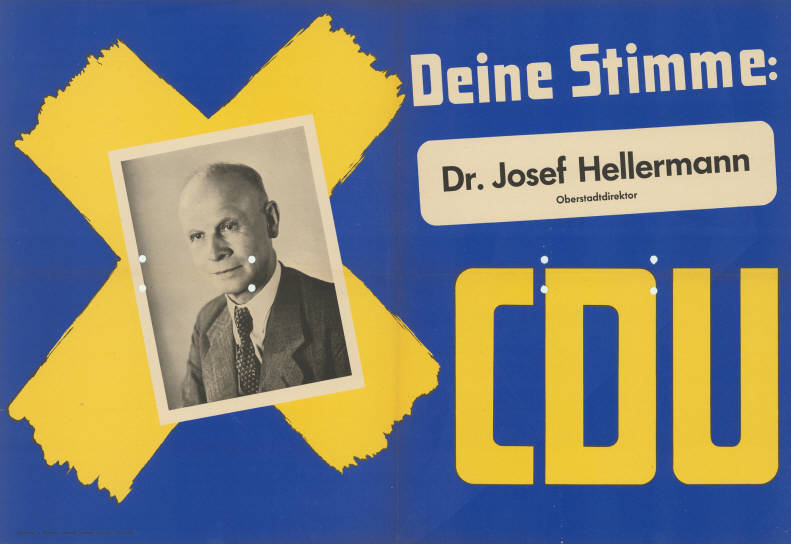 Deine Stimme: Dr. Josef Hellermann Oberstadtdirektor CDU Abbildung: Porträtfoto - Stimmkreuz Plakatart: Kandidaten-/Personenplakat mit Porträt Drucker_Druckart_Druckort: Bilddruck u. Klischee Lambert Lensing G.m.b.H., Dortmund Objekt-Signatur: 10-009 : 161 Bestand: Landtagswahlplakate Nordrhein-Westfalen (10-009) GliederungBestand10-18: Landtagswahlplakate Nordrhein-Westfalen (10-009) » Landtagswahl am 18.6.1950 » CDU » mit Porträtfoto Lizenz: KAS/ACDP 10-009 : 161 CC-BY-SA 3.0 DE